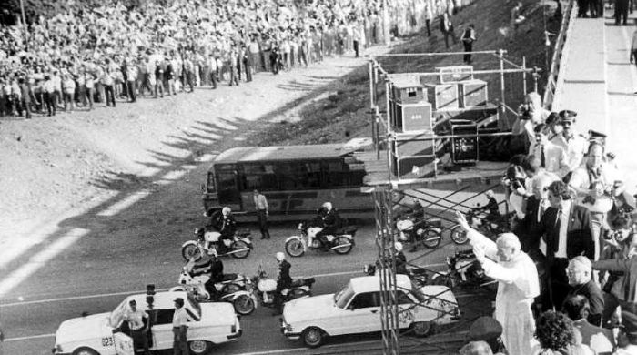 Visita del Papa Juan Pablo II a Mendoza el 7 de Abril de 1987.